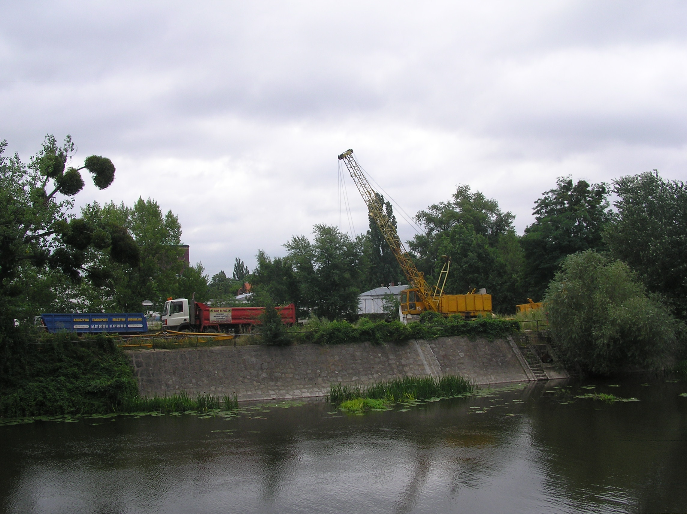 Wrocław, Port Ujście Oławy